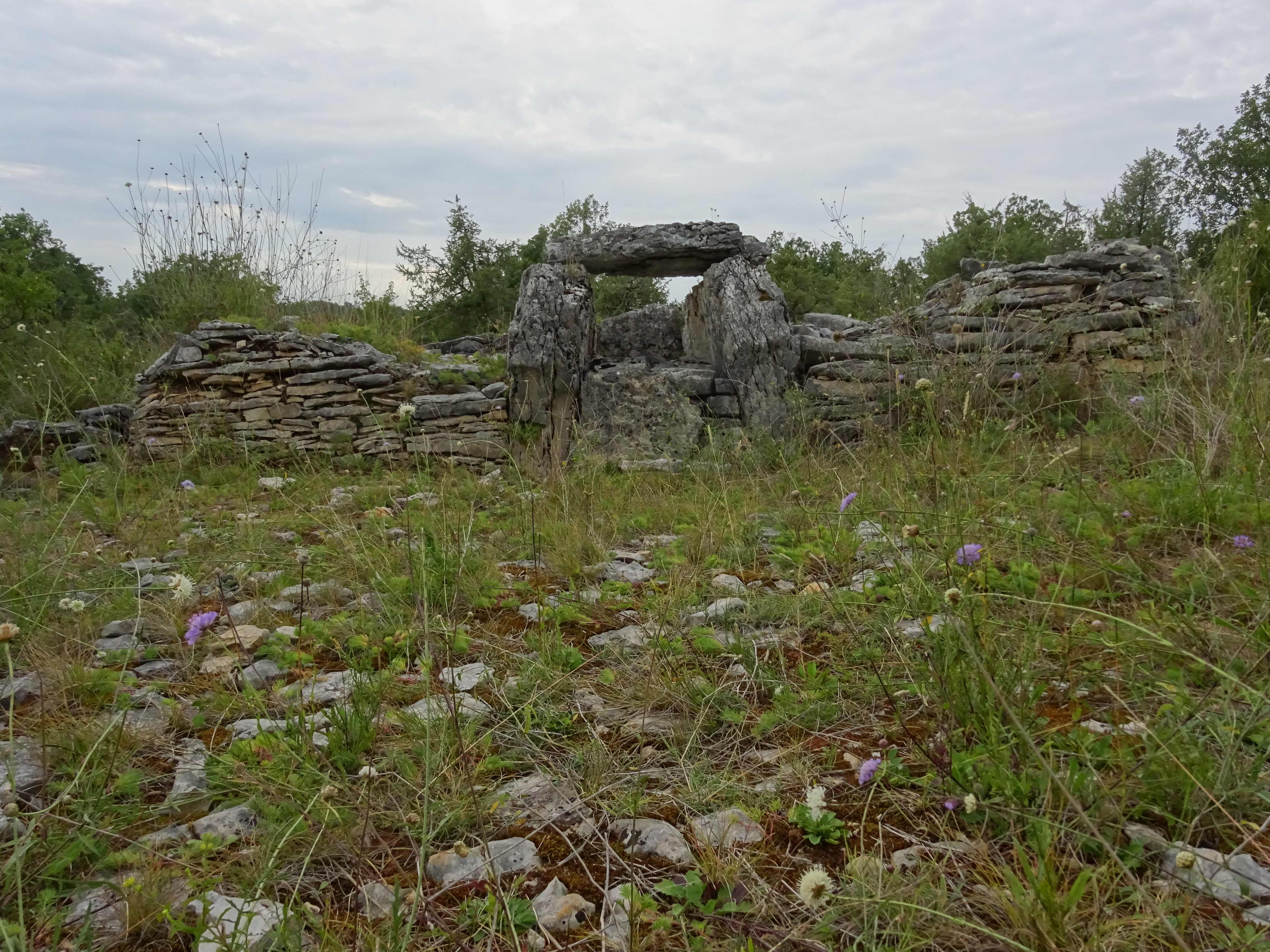 Dolmen de la Devèze, commune de Marcilhac-sur-Célé, Lot. Sud-Est.